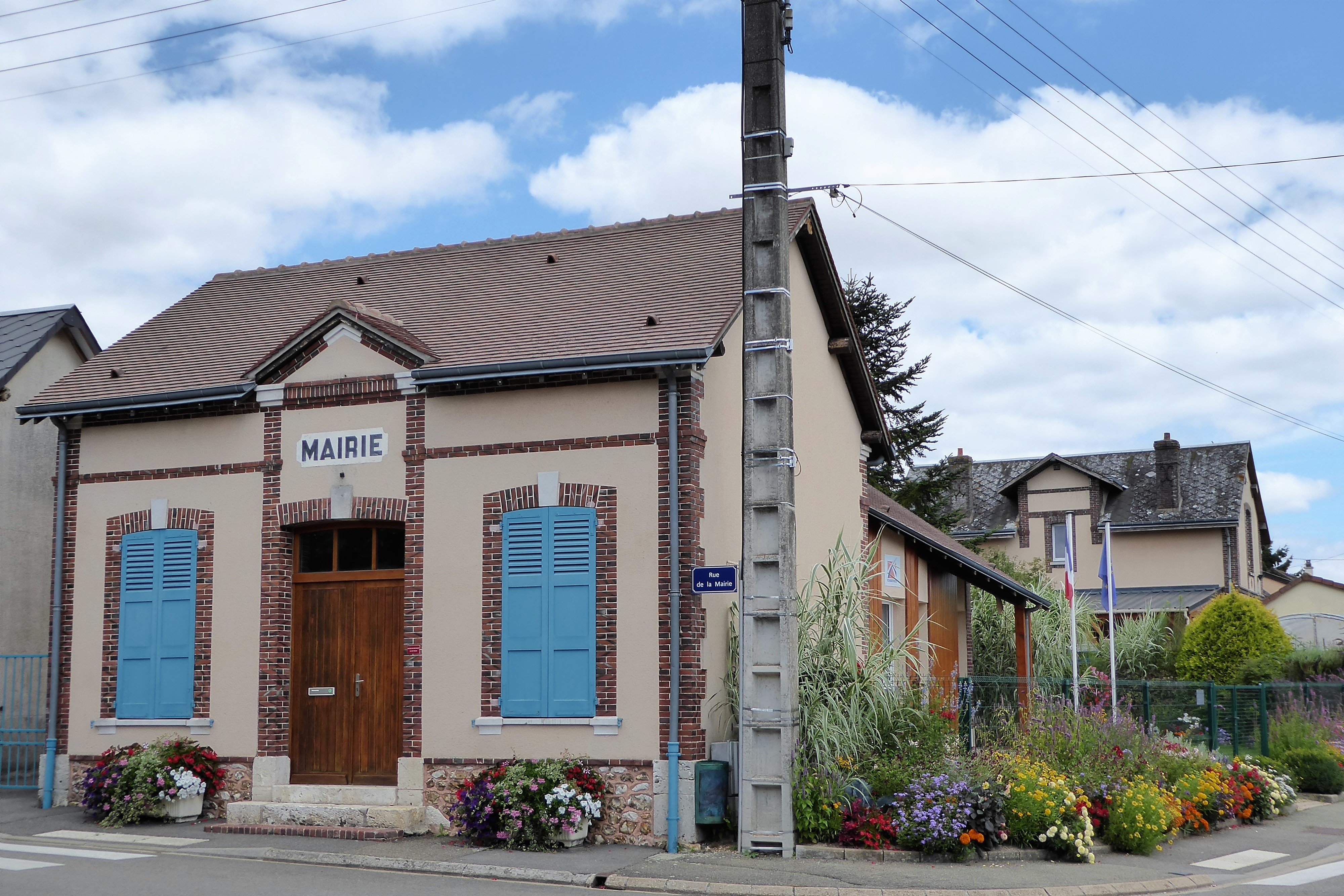 mairie, Cintray, Eure-et-Loir (France).